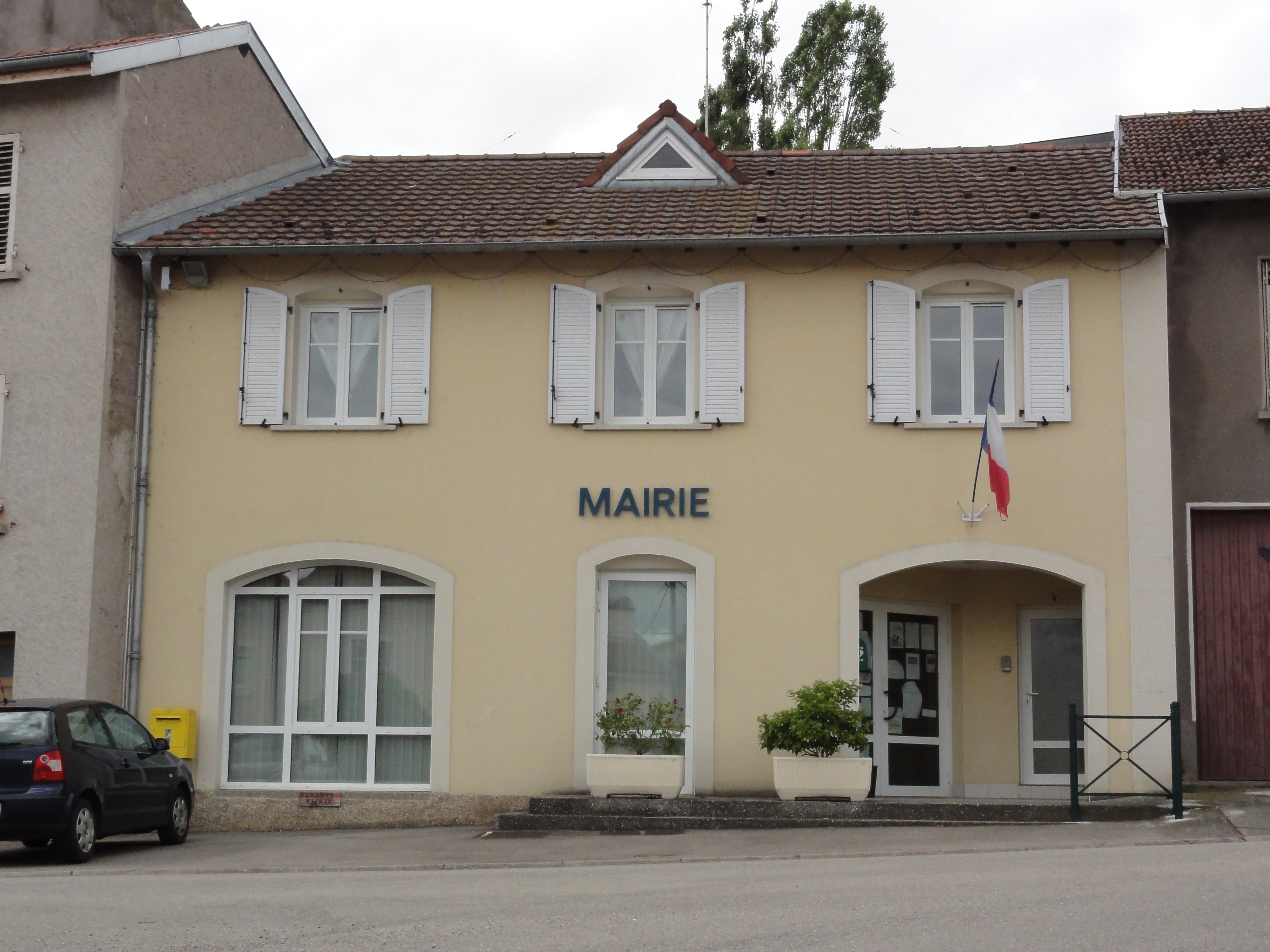 Laneuveville-devant-Bayon (M-et-M) mairie